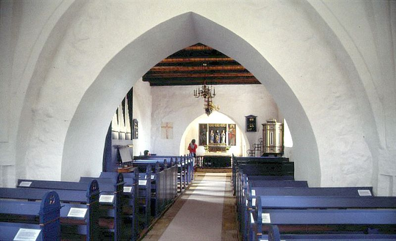 Brudager Kirke i Danmark. Skibet set mod øst